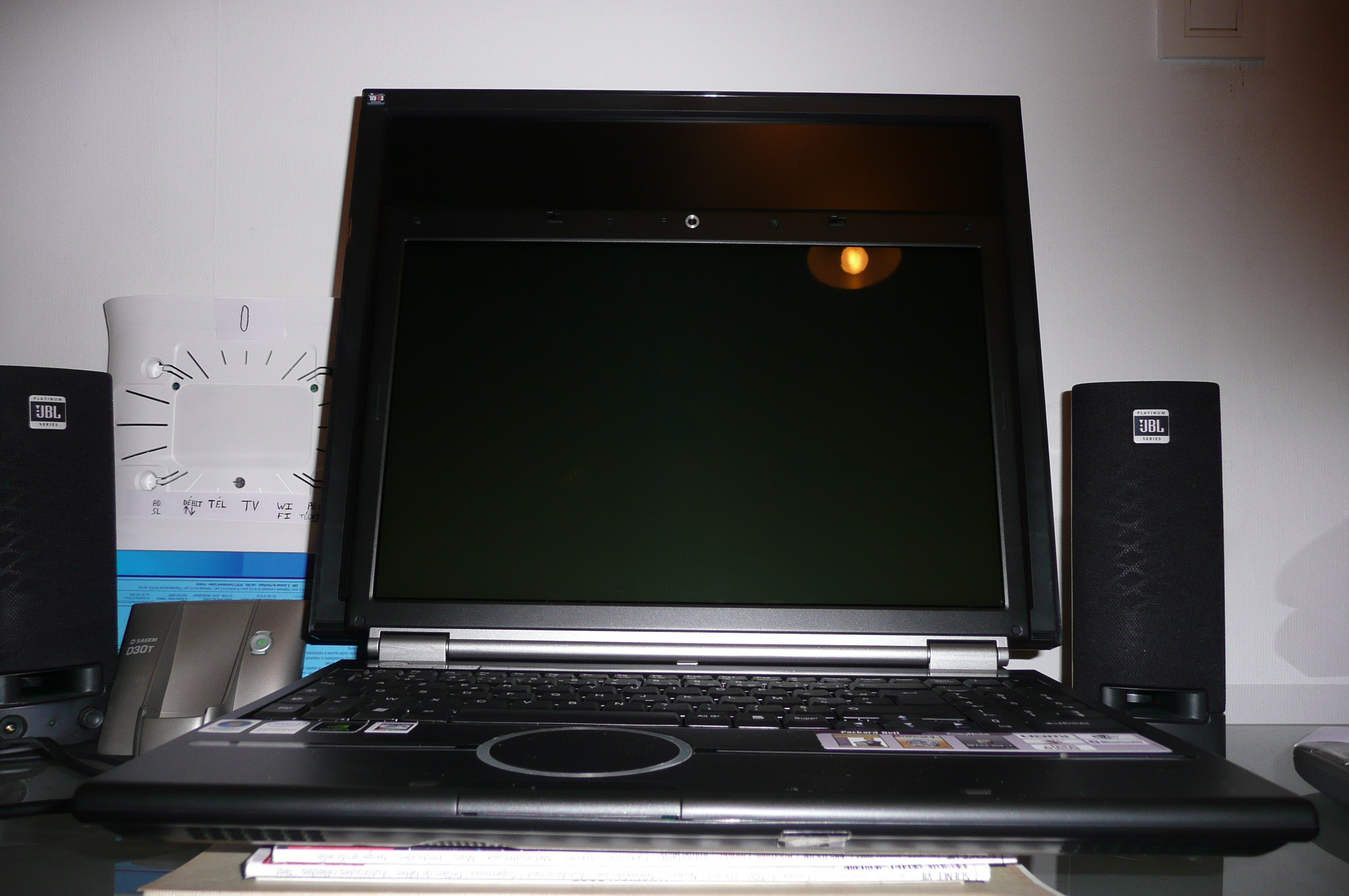 Portable avec écran 15,4 pouces 1280 × 800 pixels et écran 19,1 pouces 1280 × 1024 pixels.